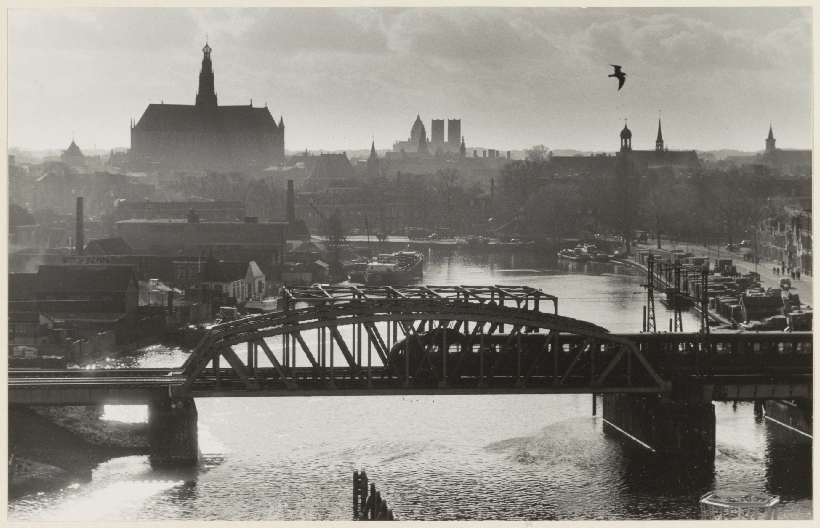 CollectieCollectie Fotoburo de BoerInventarisnummerNL-HlmNHA_54005380BeschrijvingSpoorbrug over het Spaarne met op de achtergrond de Grote of St. Bavokerk en de kathedrale basiliek St. Bavo.FotonummerNL-HlmNHA_1478_5272DocumenttypeTopografische prenten, tekeningen en foto'sVervaardigerBoer, Cees de (1918-1985) Soort vervaardigerFotograaf LandNederland ProvincieNoord-Holland GemeenteHaarlem PlaatsHaarlem StraatSpaarne GeografischSpaarne Begindatum1956Einddatum1958TechniekFoto TrefwoordenStadsgezichten, Panorama's en profielen, Bruggen